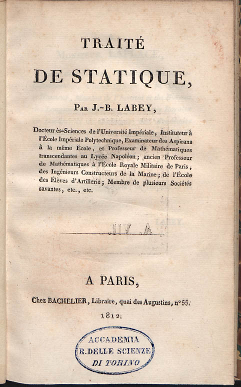 Frontespizio